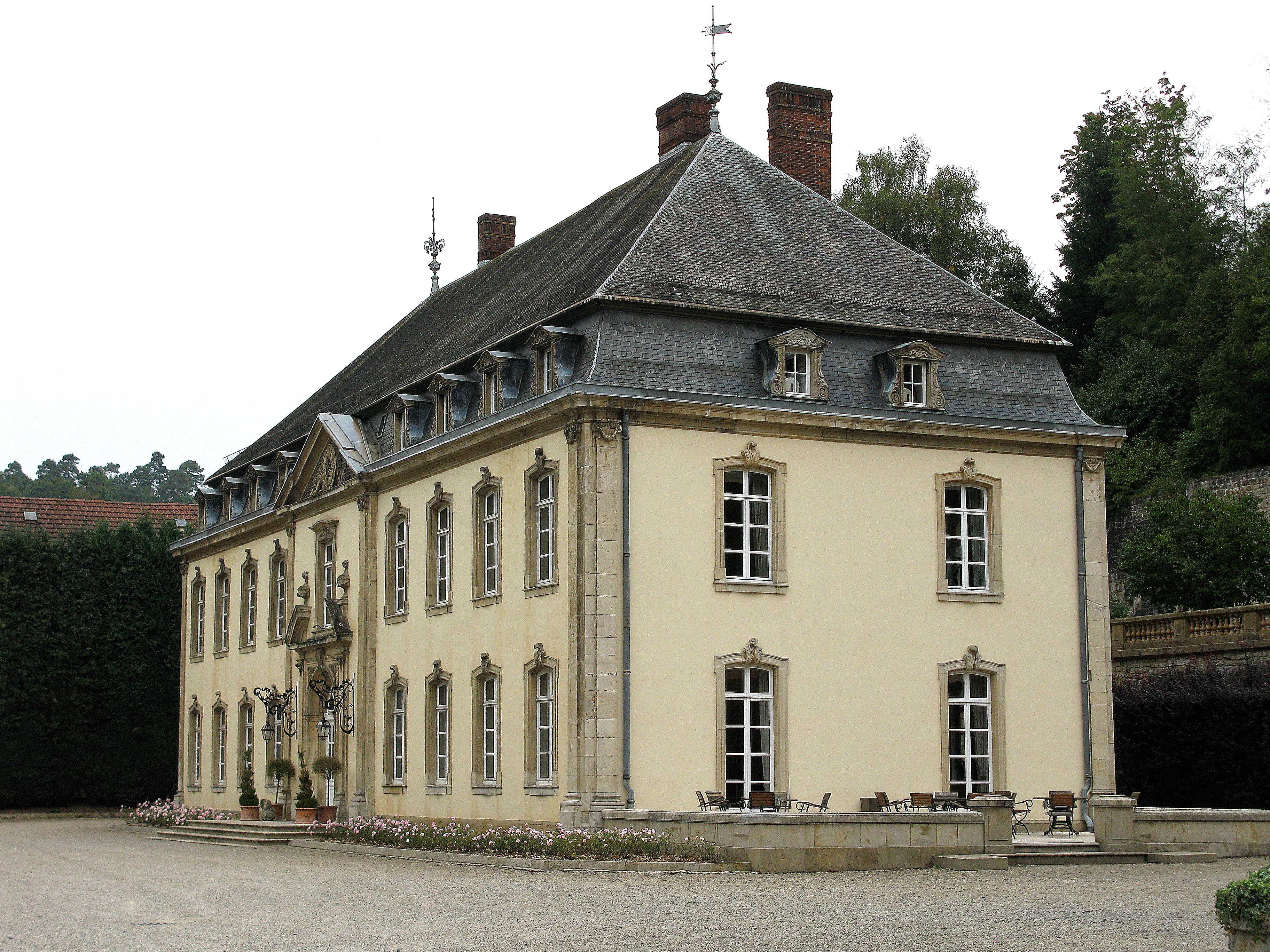 Schlass Siweburen